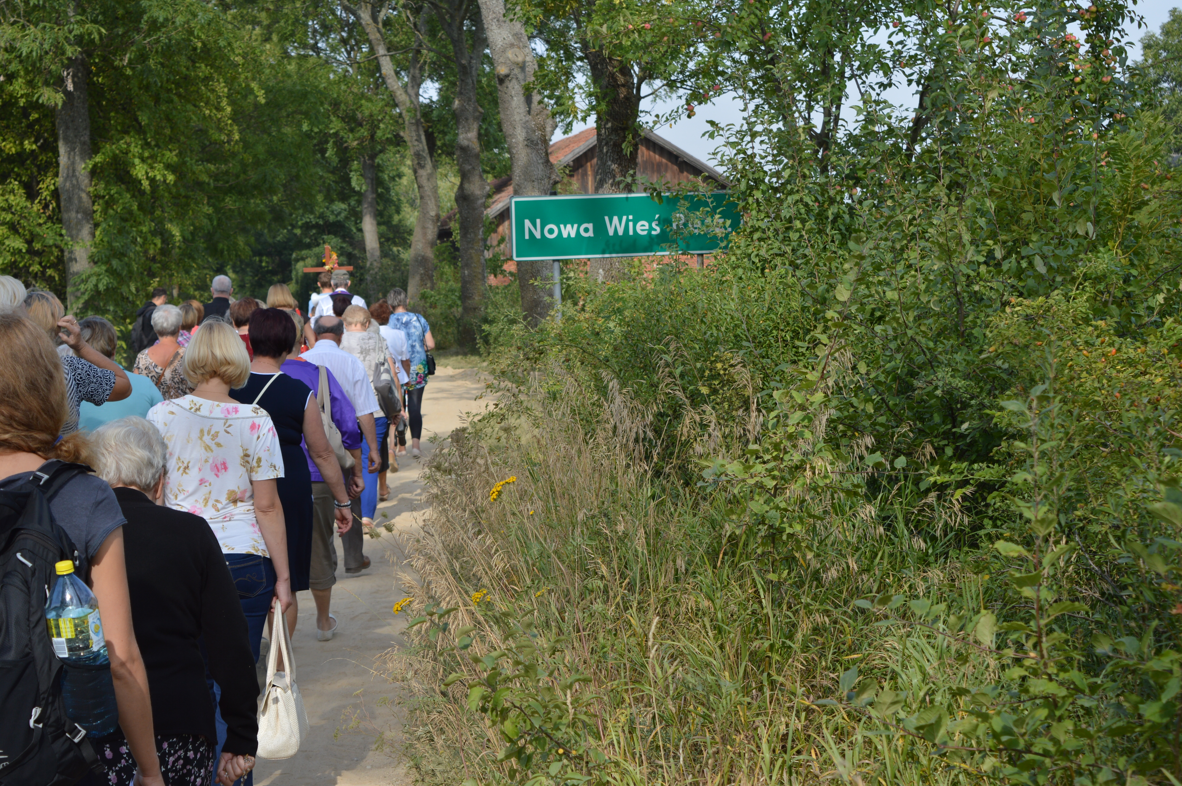 Pielgrzymka z Sątop-Samulewa do Nowej Wsi Reszelskiej